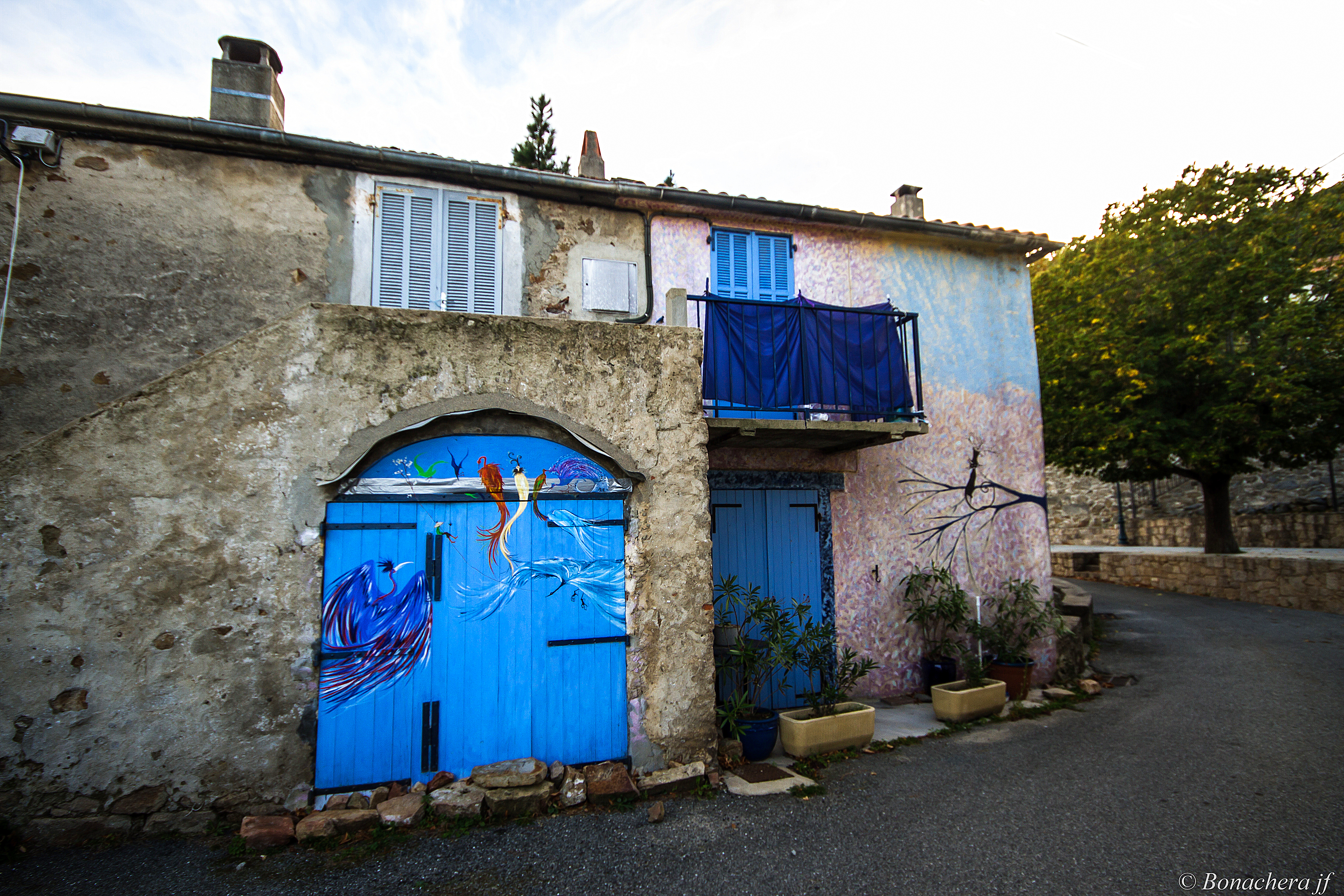 Une rue de Solaro